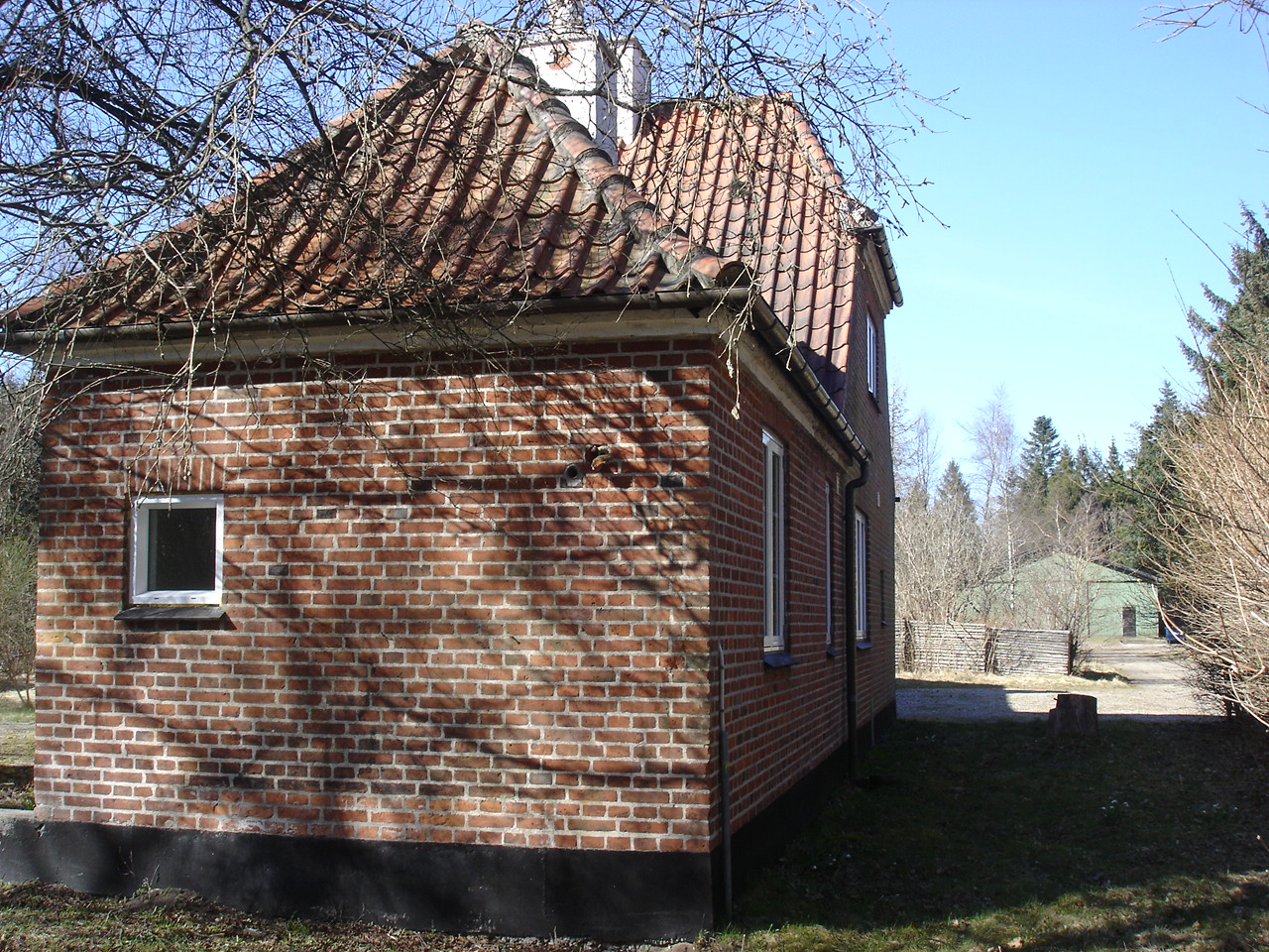 Hjøllund Station fra vejsiden